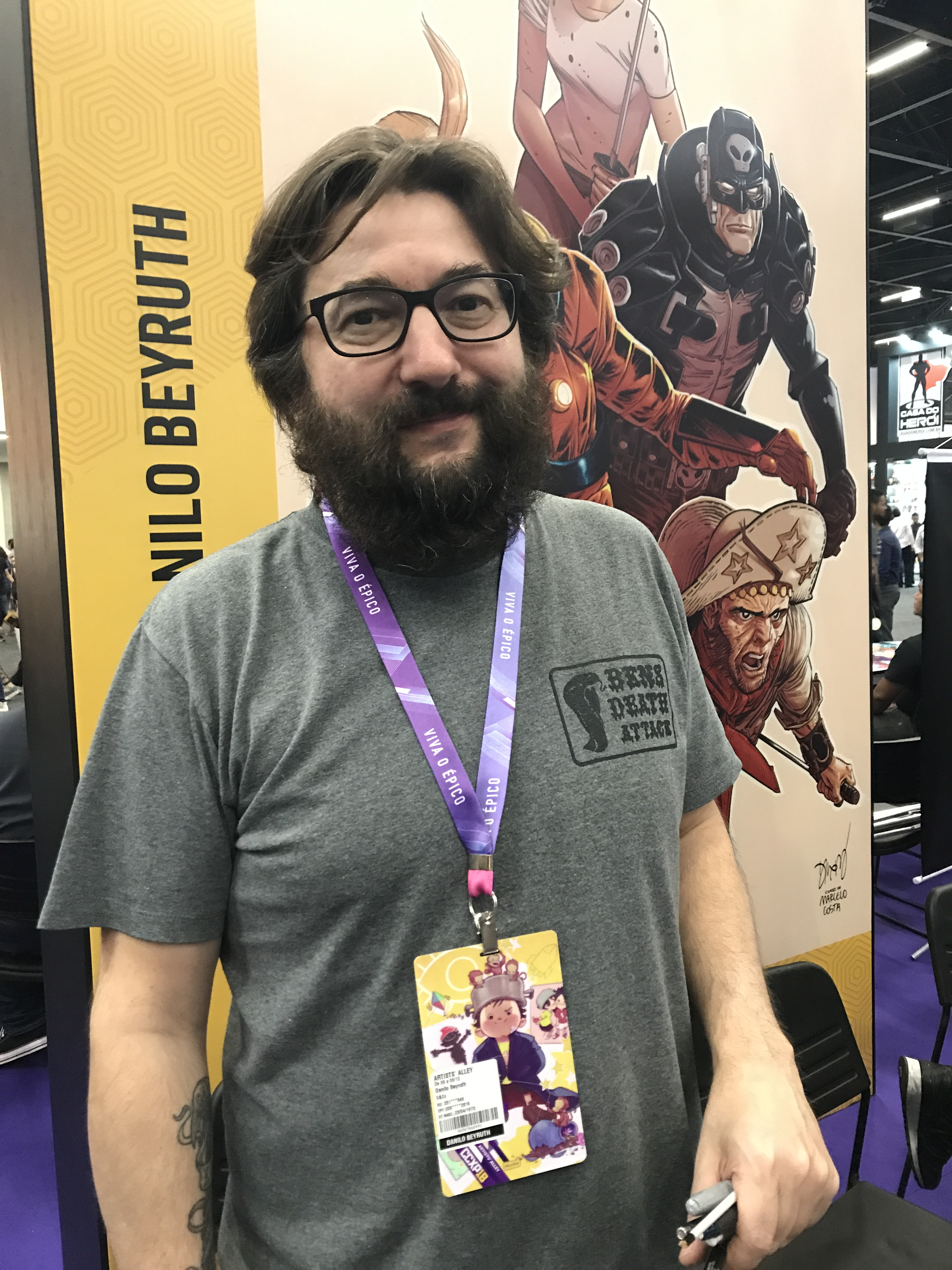 Artista Danilo Beyruth na edição de 2018 da Comic Con Experience.